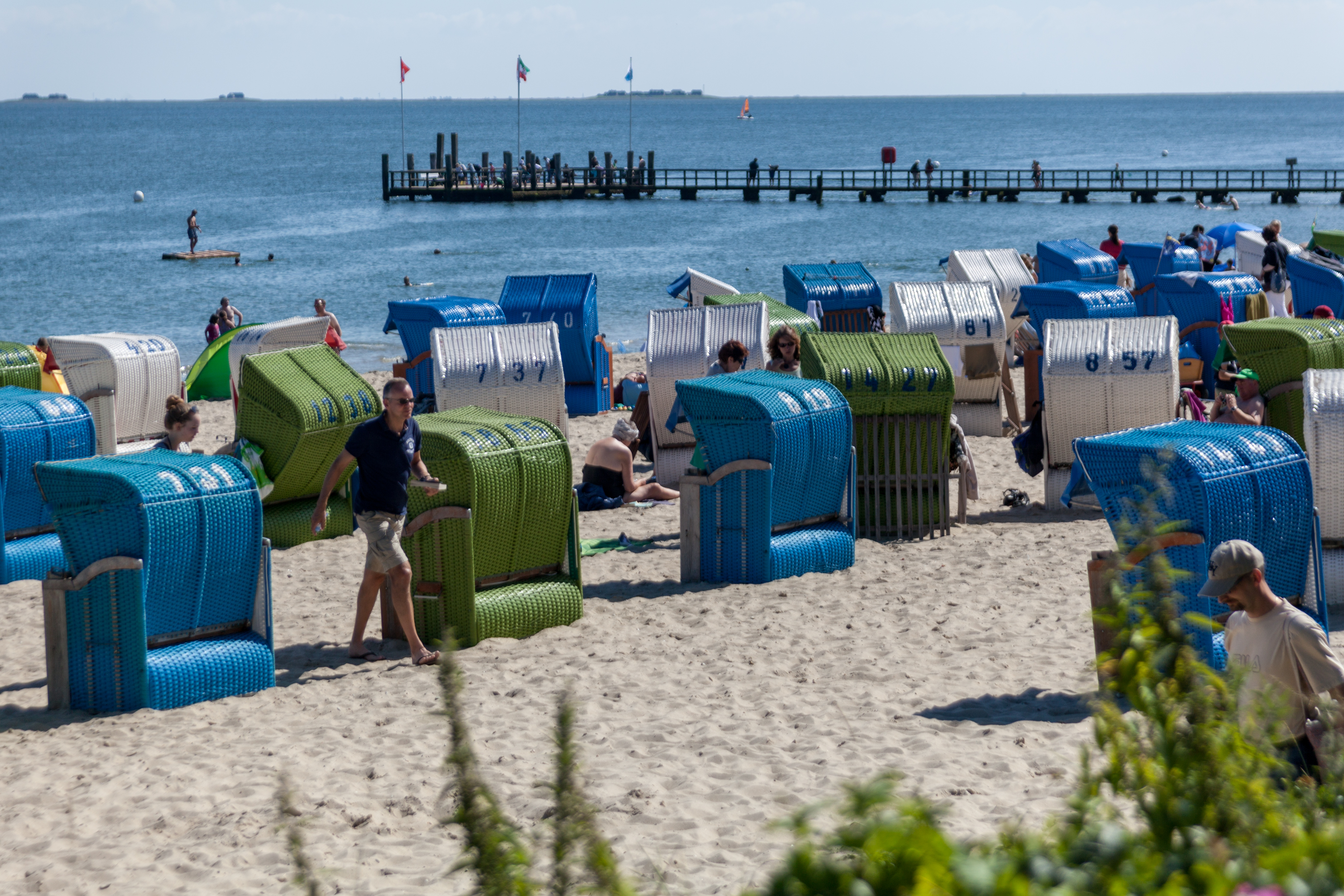 Wyk beach